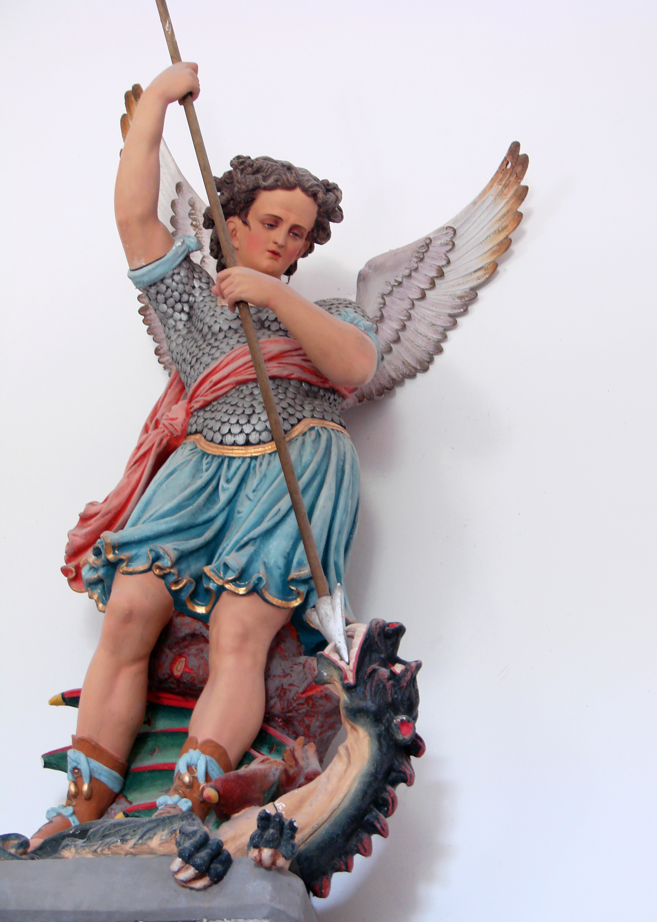 Eglise Saint-Nicolas, à Bourcq, Ardennes (O8).Statue de Saint Michel.